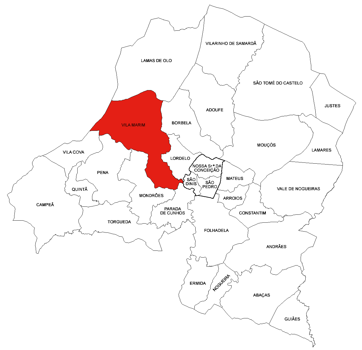 Freguesia de Vila Marim (concelho de Vila Real)